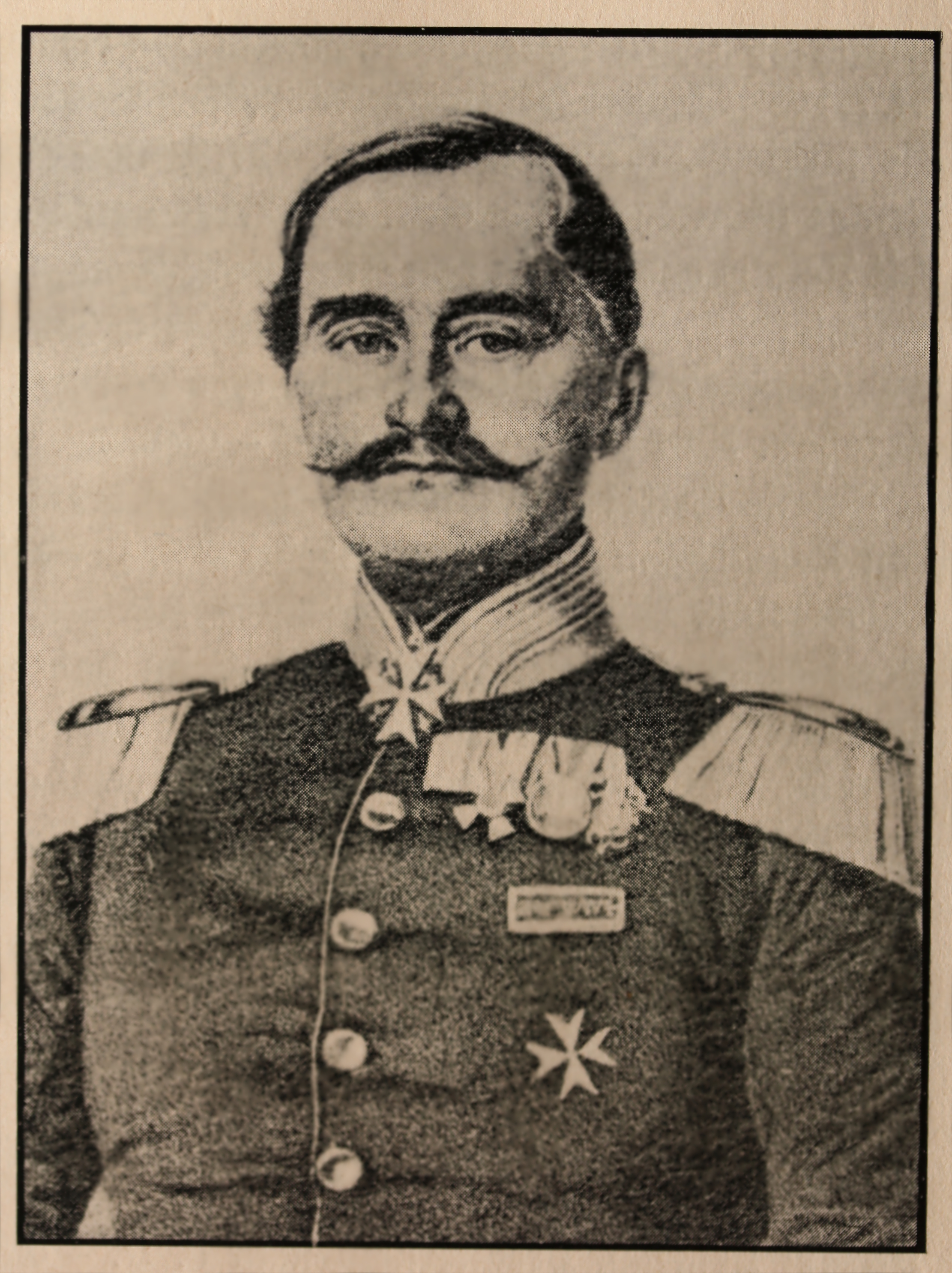 Portraitbild des späteren Generalleutnants Anton August von Below